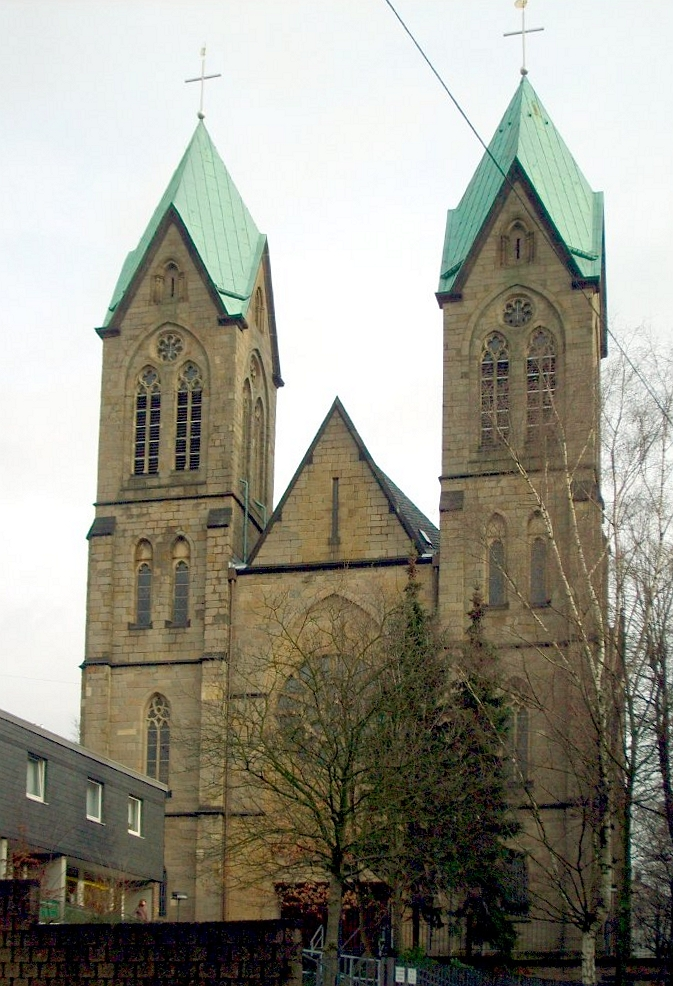 Wuppertal-Oberbarmen, Sankt Johann Baptist